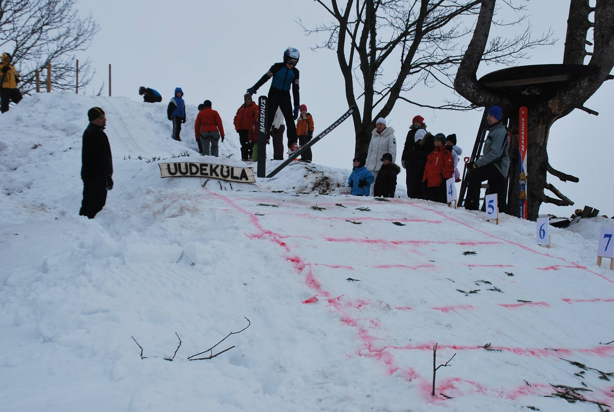 Suusahüppajad Uudekülas 27. veebruaril 2010